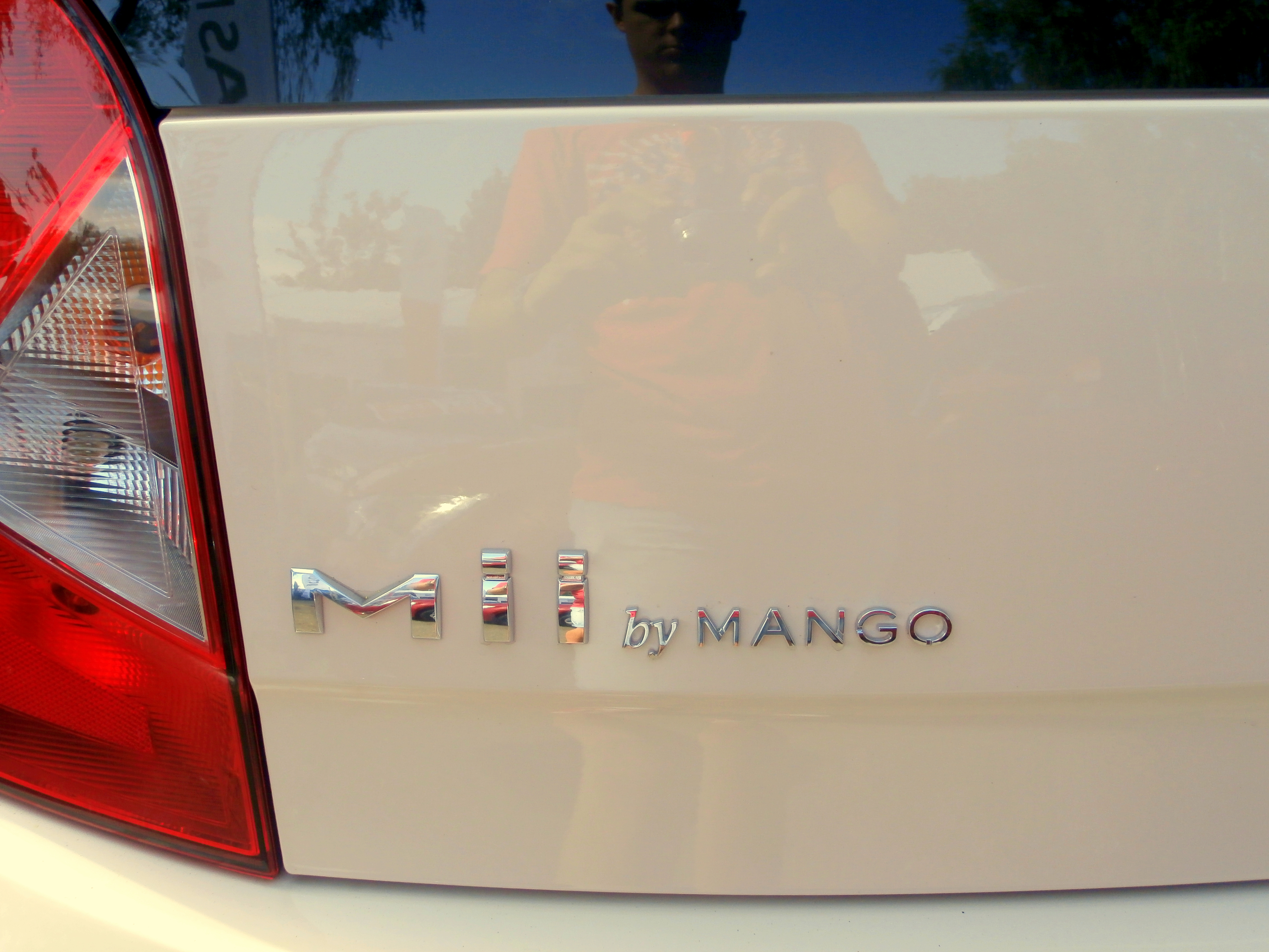 SEAT Mii by Mango Beige Glam Logo Portón Trasero 2014